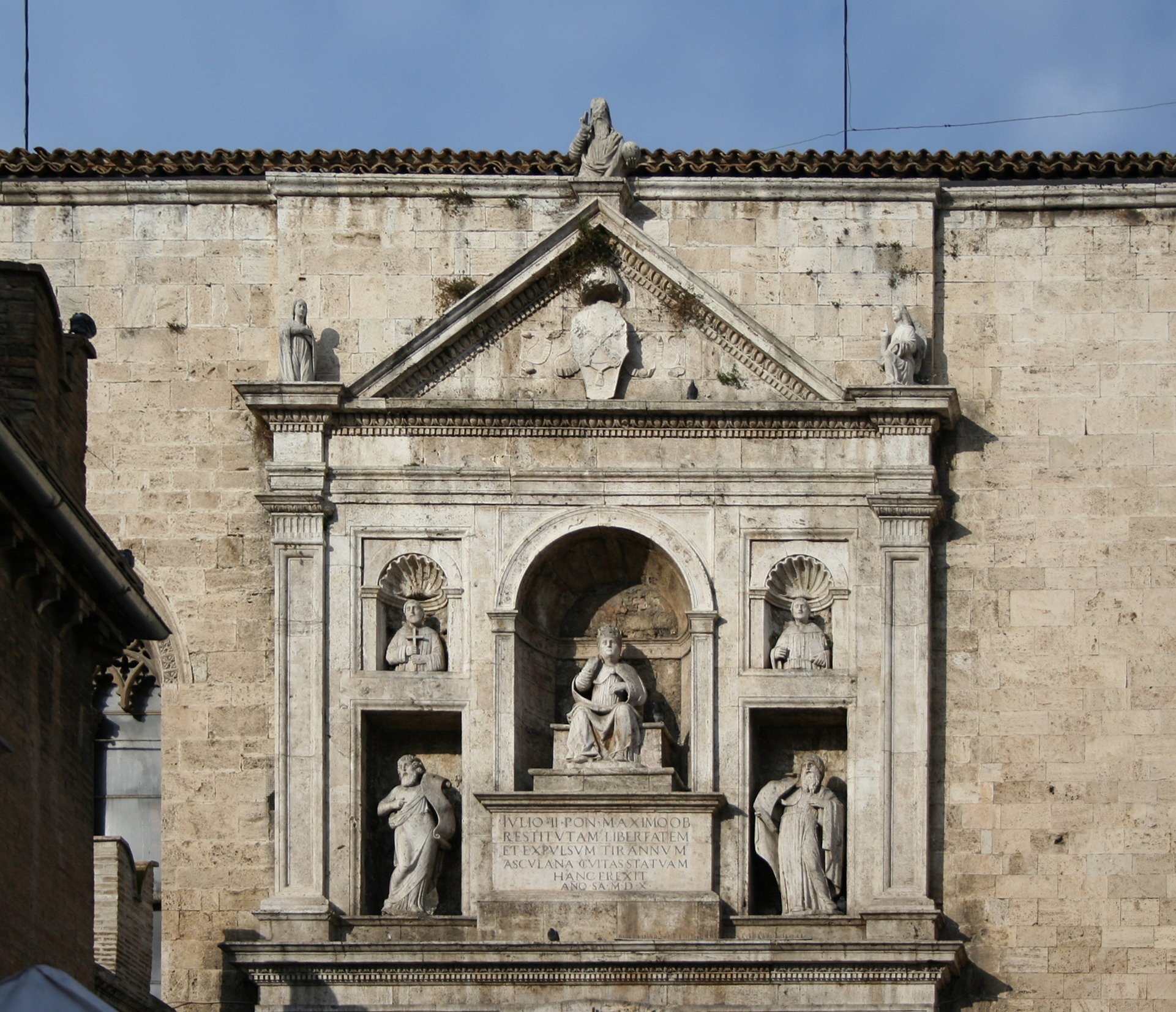 Monumento a Papa Giulio II collocato sulla facciata destra della Chiesa di San Francesco di Ascoli Piceno.